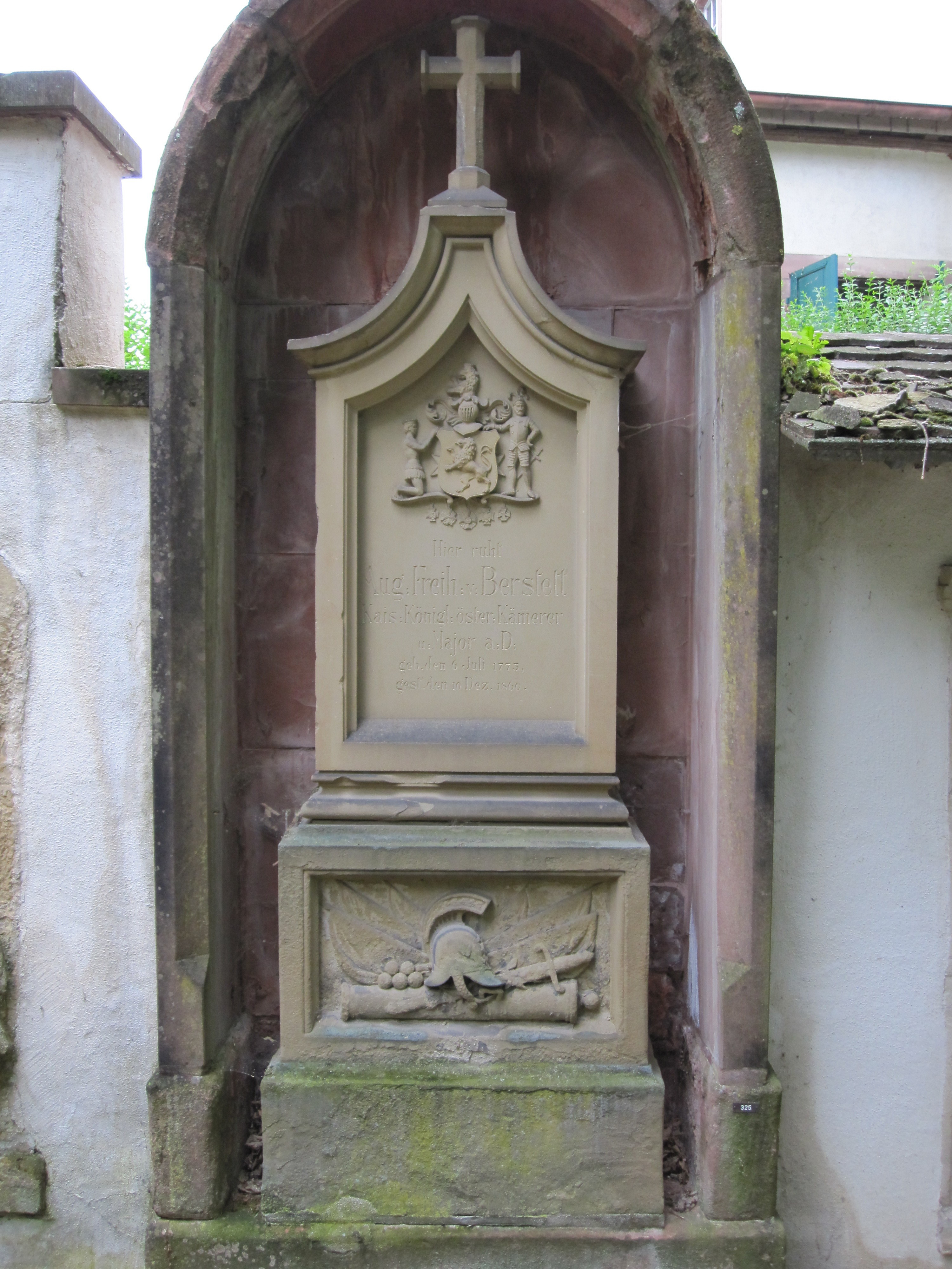 Freiburg, Alter Friedhof, Tombe d'Auguste, Baron de Berstett (1773-1860): Chambellan et major au service de l'Autriche